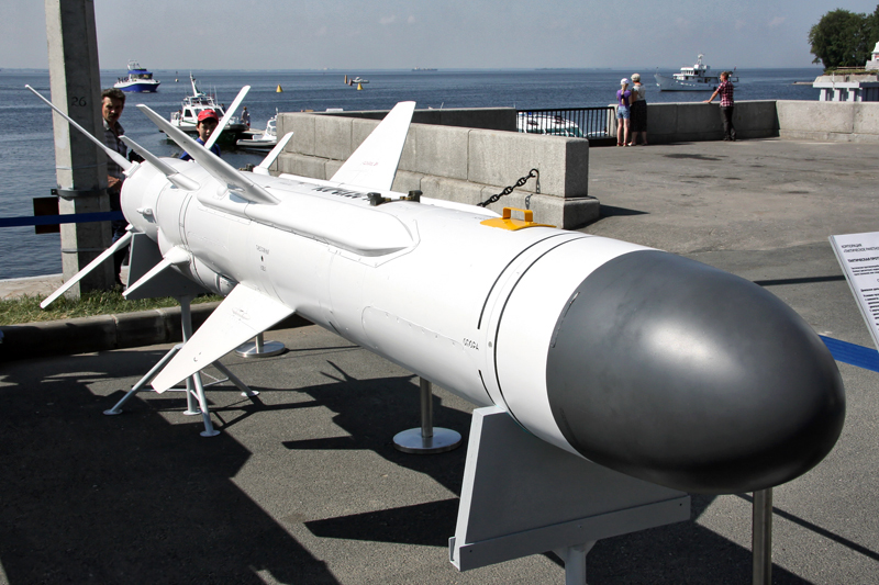 Тактическая противокорабельная ракета Х-35УЭ (Tactical anti-ship missile Kh-35UE)